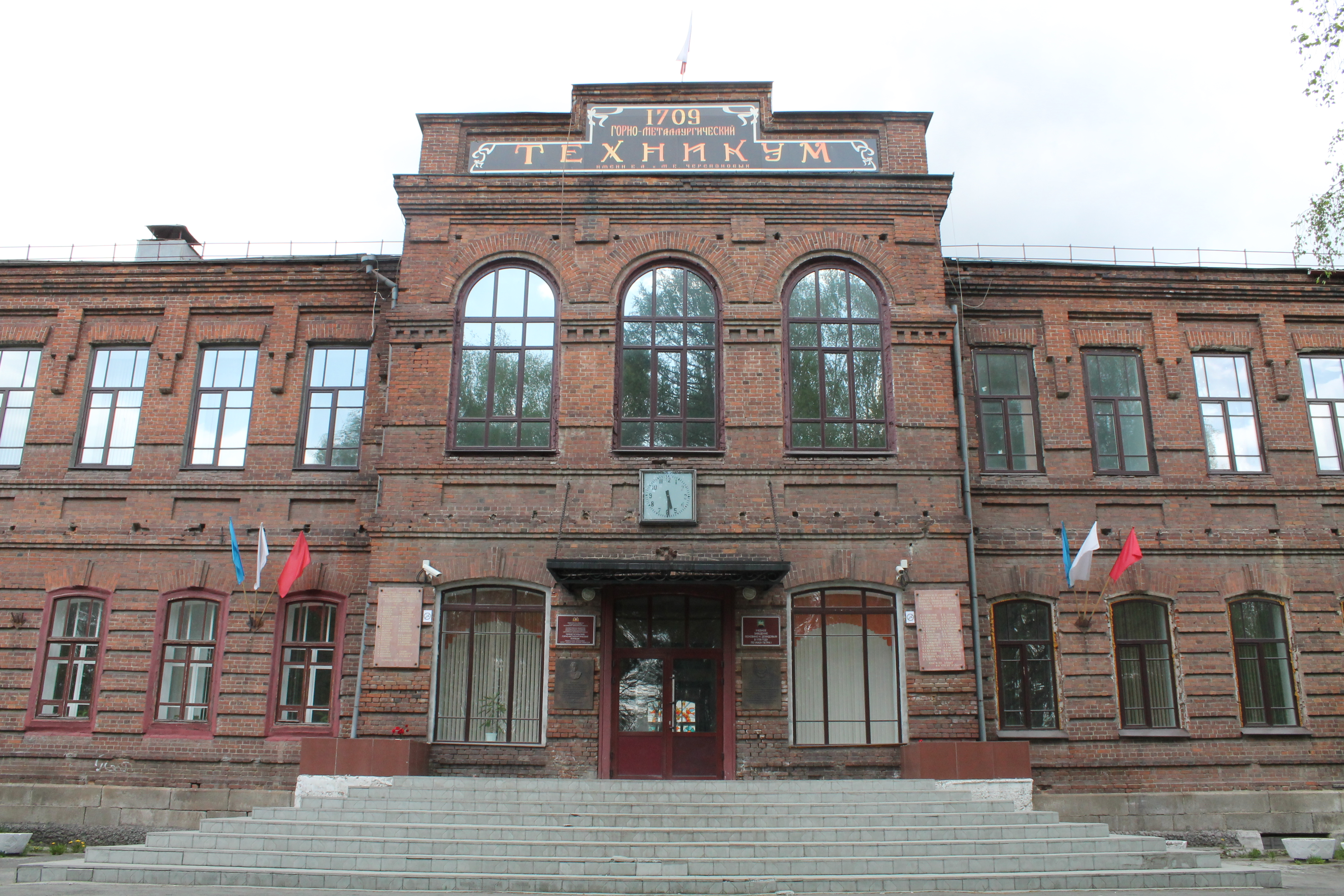 Нижний Тагил, проспект Ленина, 38